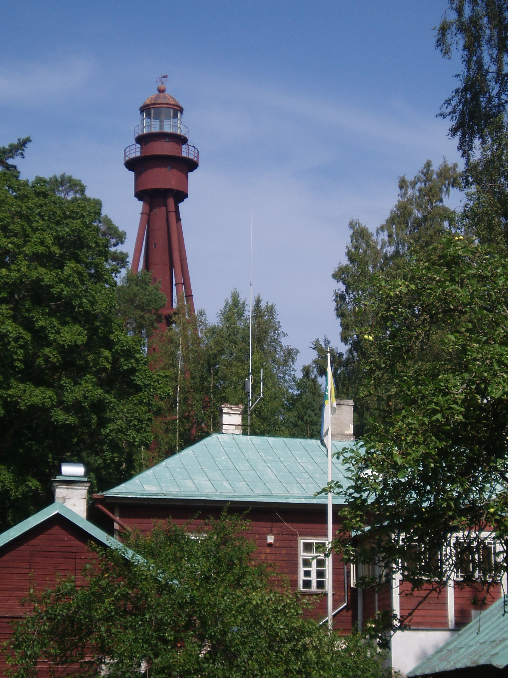 Ruhnu tuletorni ülevaataja elamu